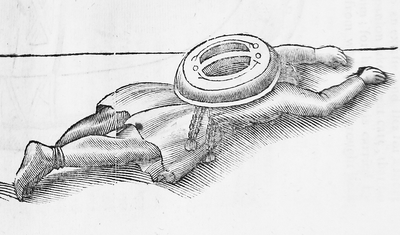 Ausschnitt: Rechter liegender Noajdde einer Illustration aus Johannes Schefferus "Lapponia"